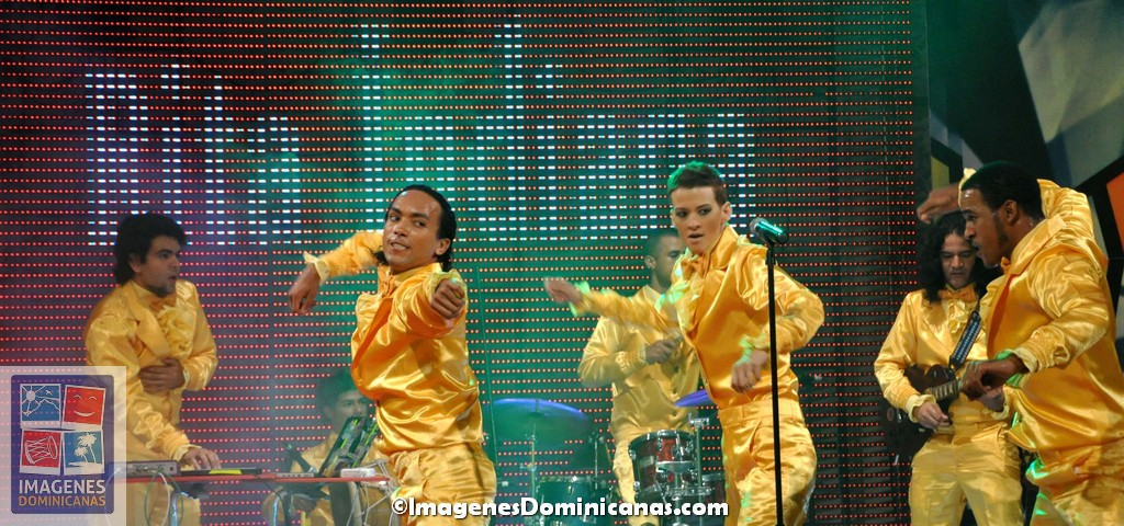 Agrupación de merengue alternativo Rita Indiana y los Misterios.